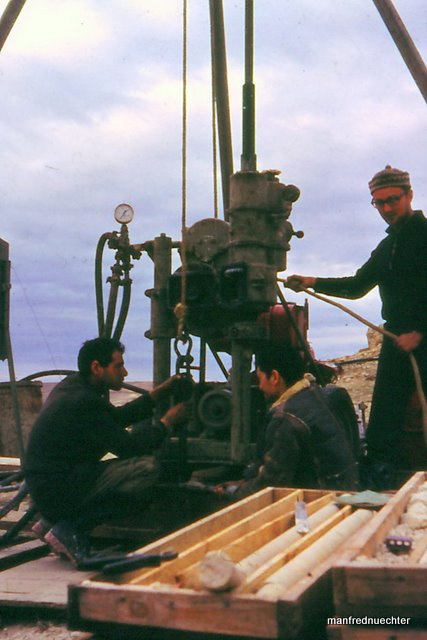 Syrien 1961